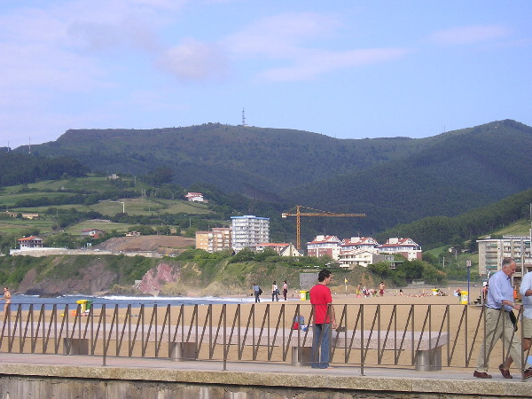 Bakioko ikuspegia portutik.